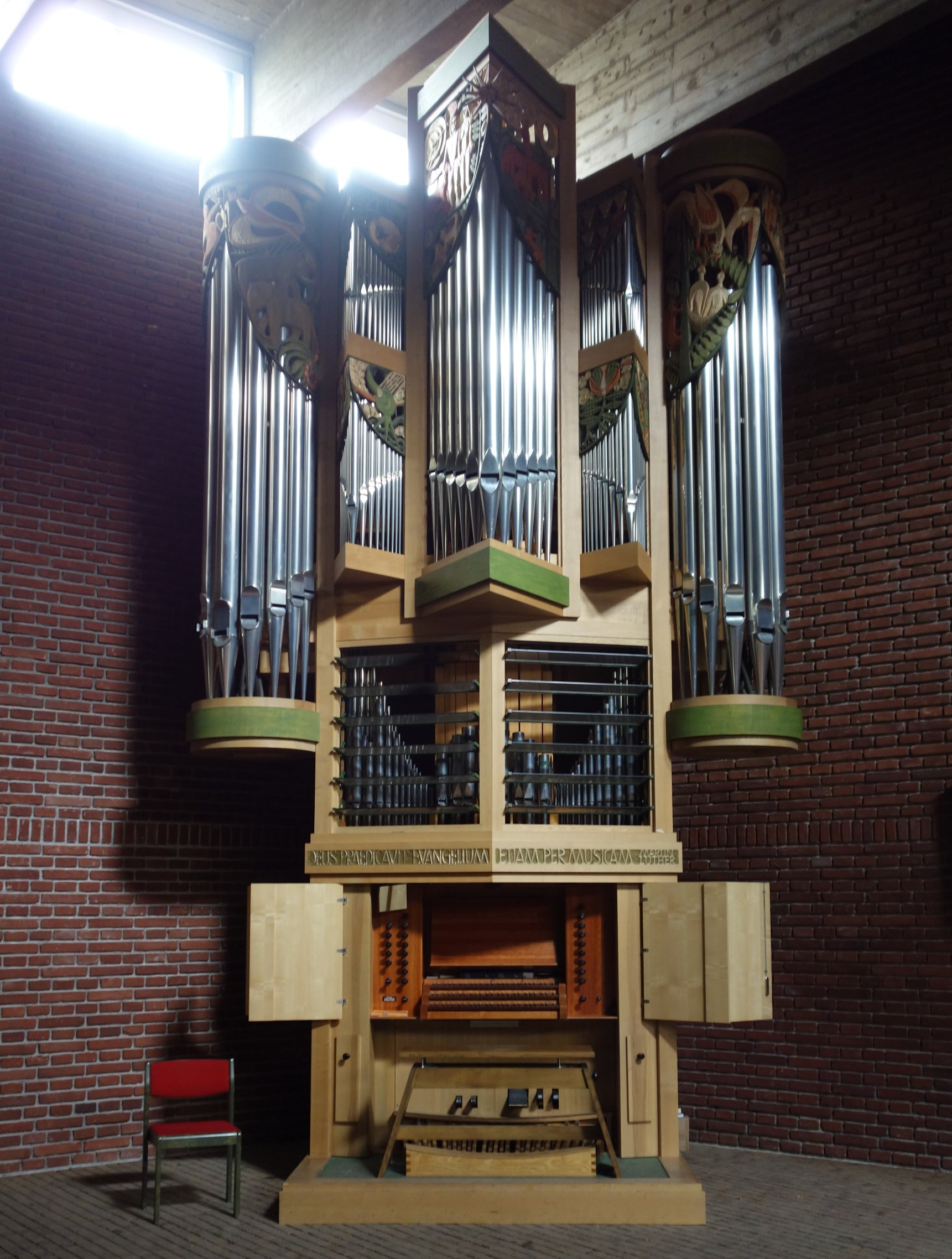 Orgel der Kreuzkirche in München (1985, H. Sandtner op. 135, II/22)